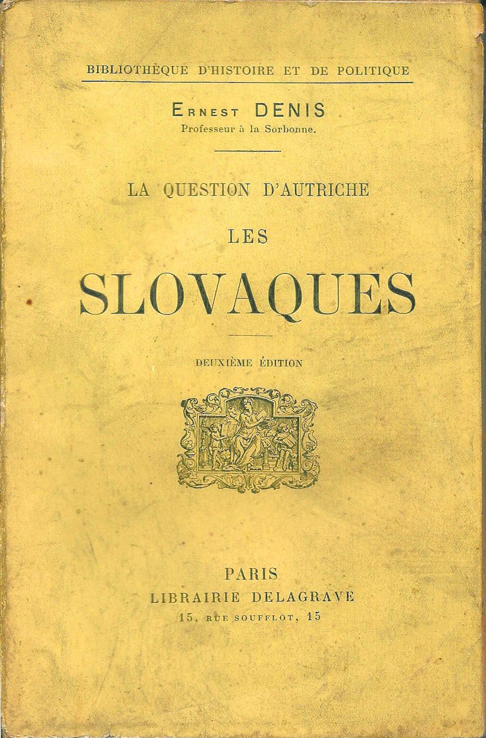 Première page de couverture de : Ernest Denis, La Question d'Autriche ; Les Slovaques, Paris, Delagrave, 1917, in-6, 283 p.